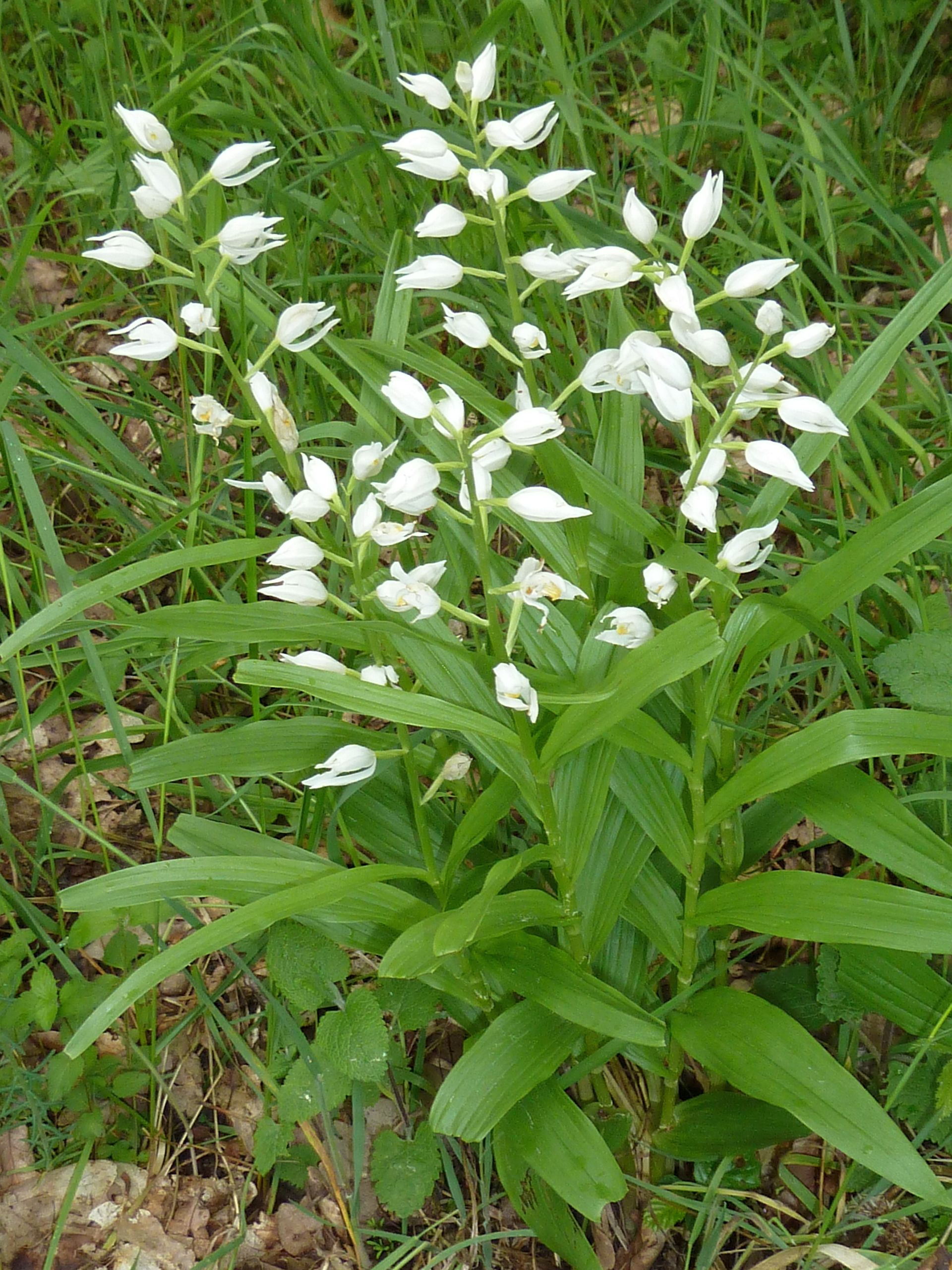 Langblättriges Waldvöglein (Cephalanthera longifolia), Durmersheim (bei Karlsruhe), 20.05.2013